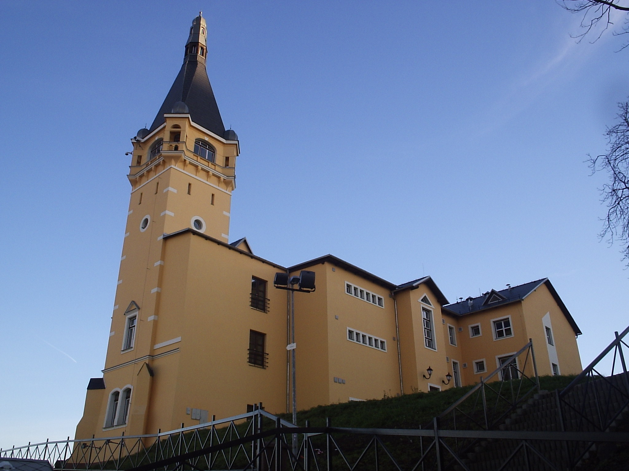 Usti nad Labem Vetruse